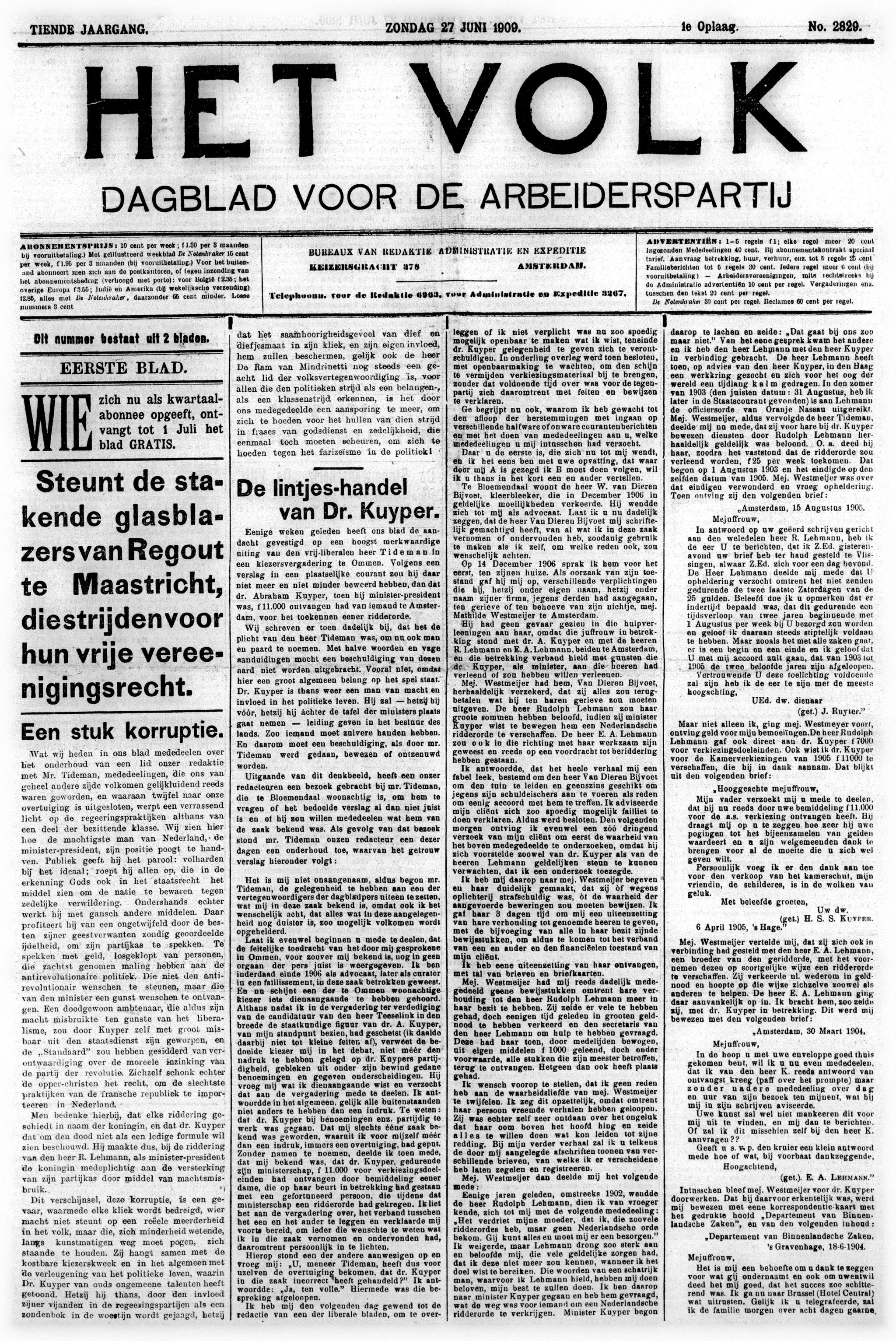 Op 2 juni 1909 was Kuyper tijdens een verkiezingsbijeenkomst in Den Ham door Mr. Pieter Tideman beschuldigd van het aannemen van 11.000 gulden in ruil voor een koninklijke onderscheiding voor "iemand". De beschuldiging kreeg in de pers nog weinig aandacht. Op 27 juni 1909, zestien dagen na de door de ARP en de confessionele partijen gewonnen verkiezingen voor de Tweede Kamer der Staten Generaal en drie dagen nadat het kabinet Heemskerk hem schriftelijk had laten weten dat het aanbleef zonder Kuyper een ministerie aan te bieden, werd Kuyper in een vraaggesprek op de voorpagina van het socialistische dagblad Het Volk, onder de kop "de lintjeshandel van Dr. Kuyper", in verband gebracht met Mathilde Westmeijer, een Amsterdamse dame van niet onbesproken gedrag, en een onderscheiding voor de Consul-Generaal van Griekenland in Amsterdam, de heer Rudolph Lehmann. Westmeijer zou in een gesprek met Kuyper hebben gevraagd hoe Lehmann - die al elf buitenlandse onderscheidingen bezat - een Nederlandse ridderorde kon verwerven. Kuyper had volgens Westmeijer gezegd dat dat "zomaar niet ging". Daarna had Westmeijer de heer Lehmann met de "heer Kuyper in verbinding gebracht".